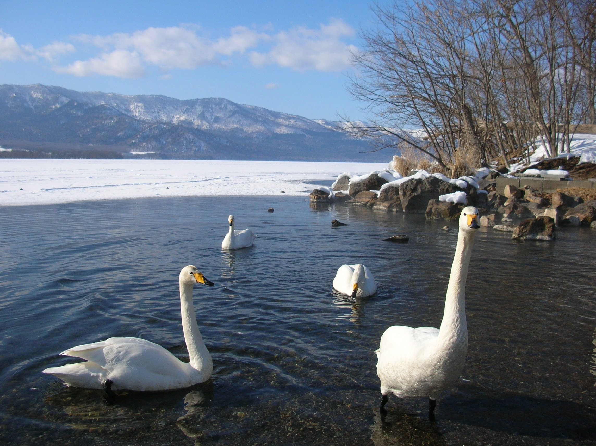 和琴半島 和琴温泉（Wakoto）